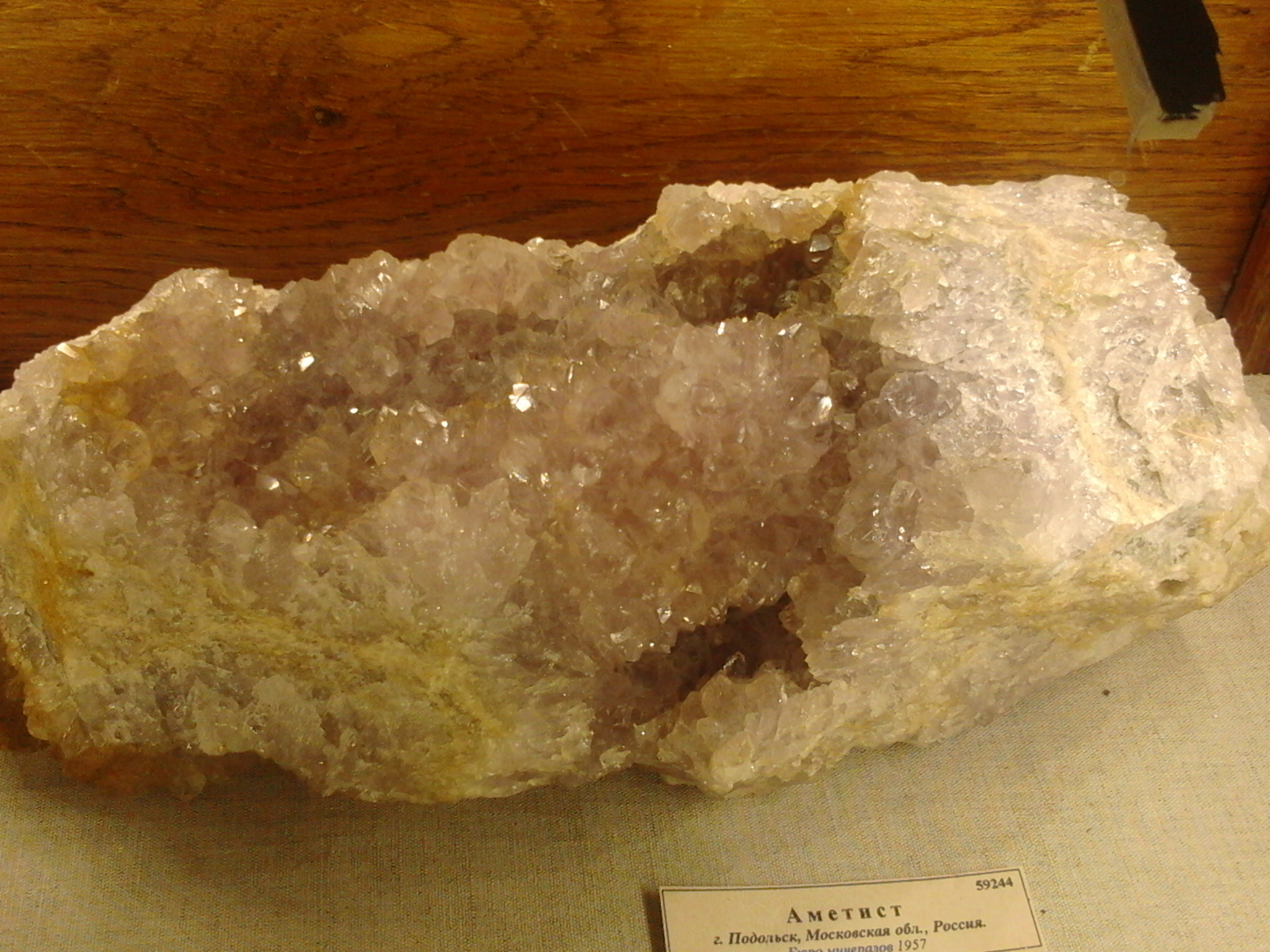 Минералогический музей имени Ферсмана, Москва. Аметист 59244 г. Подольск, Московская обл., Россия. Бюро минералов 1957